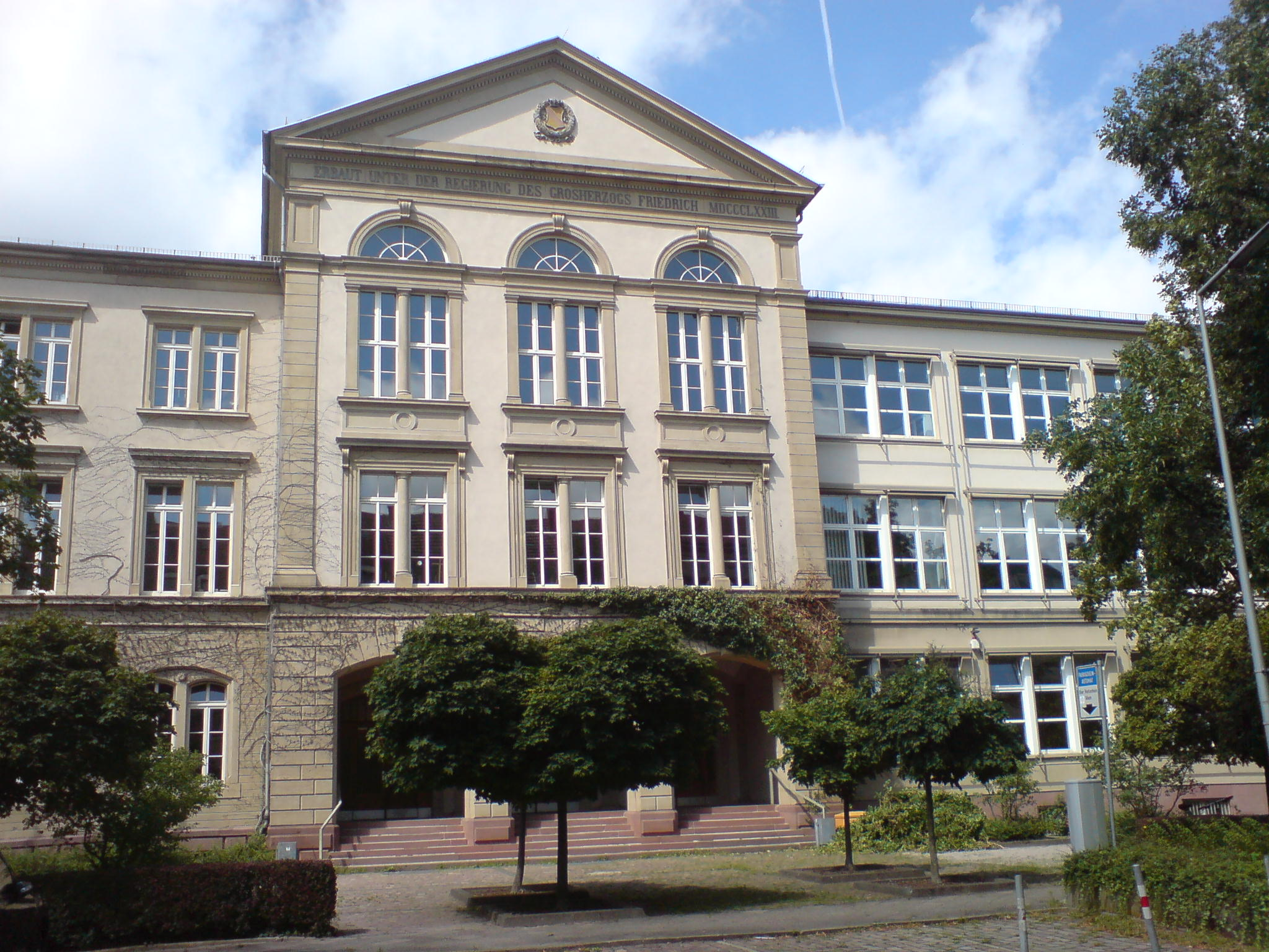 Bismarck-Gymnasium. Bismarckstr. 8, Karlsruhe/Germany.